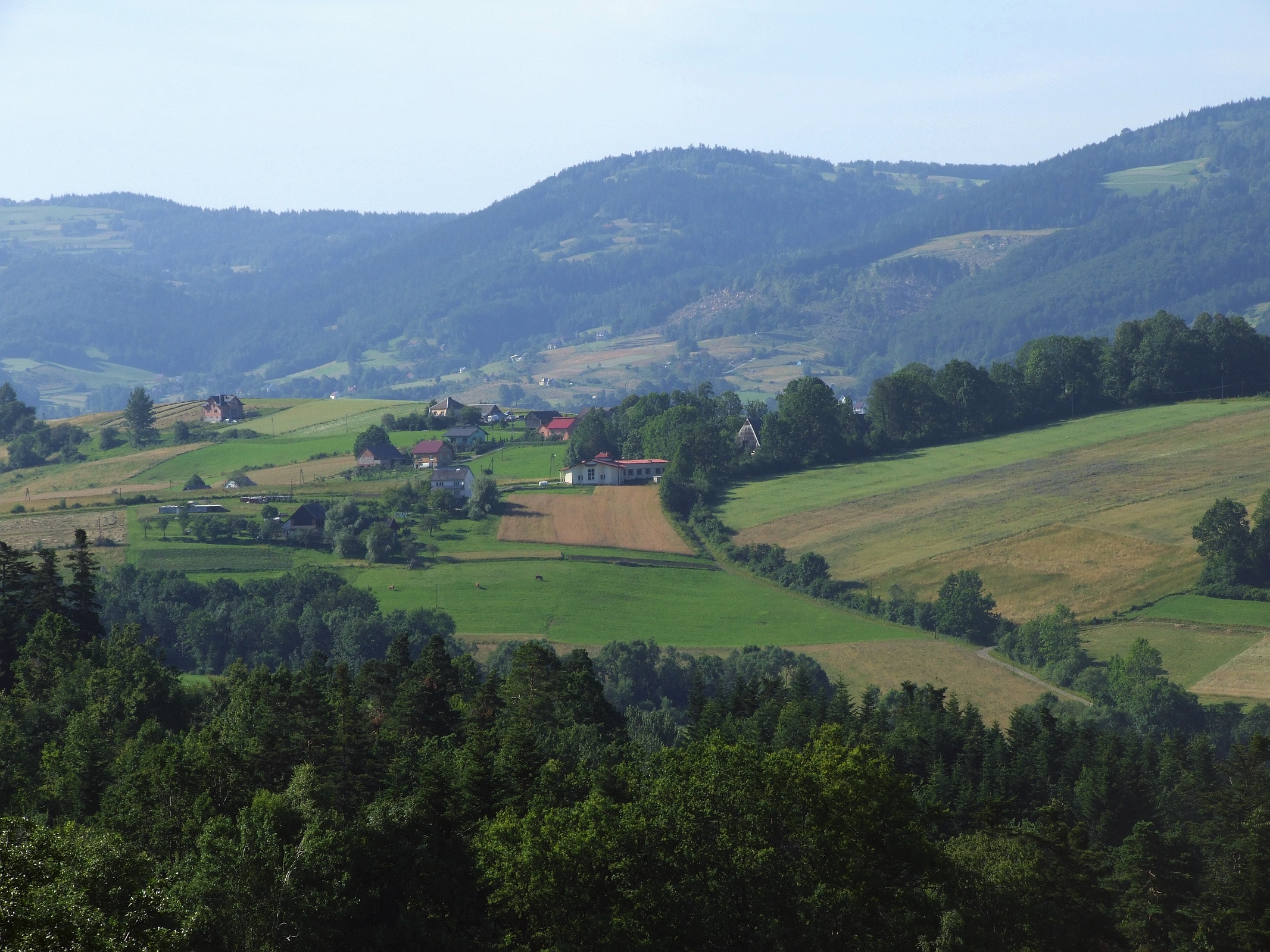 Babia Góra (na środku). Widok z Wysokiego (spod Litacza)